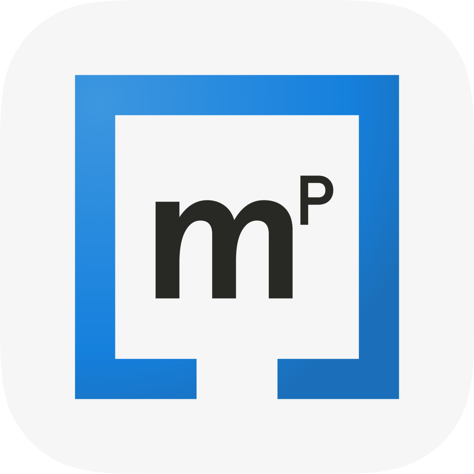 magicplan logo